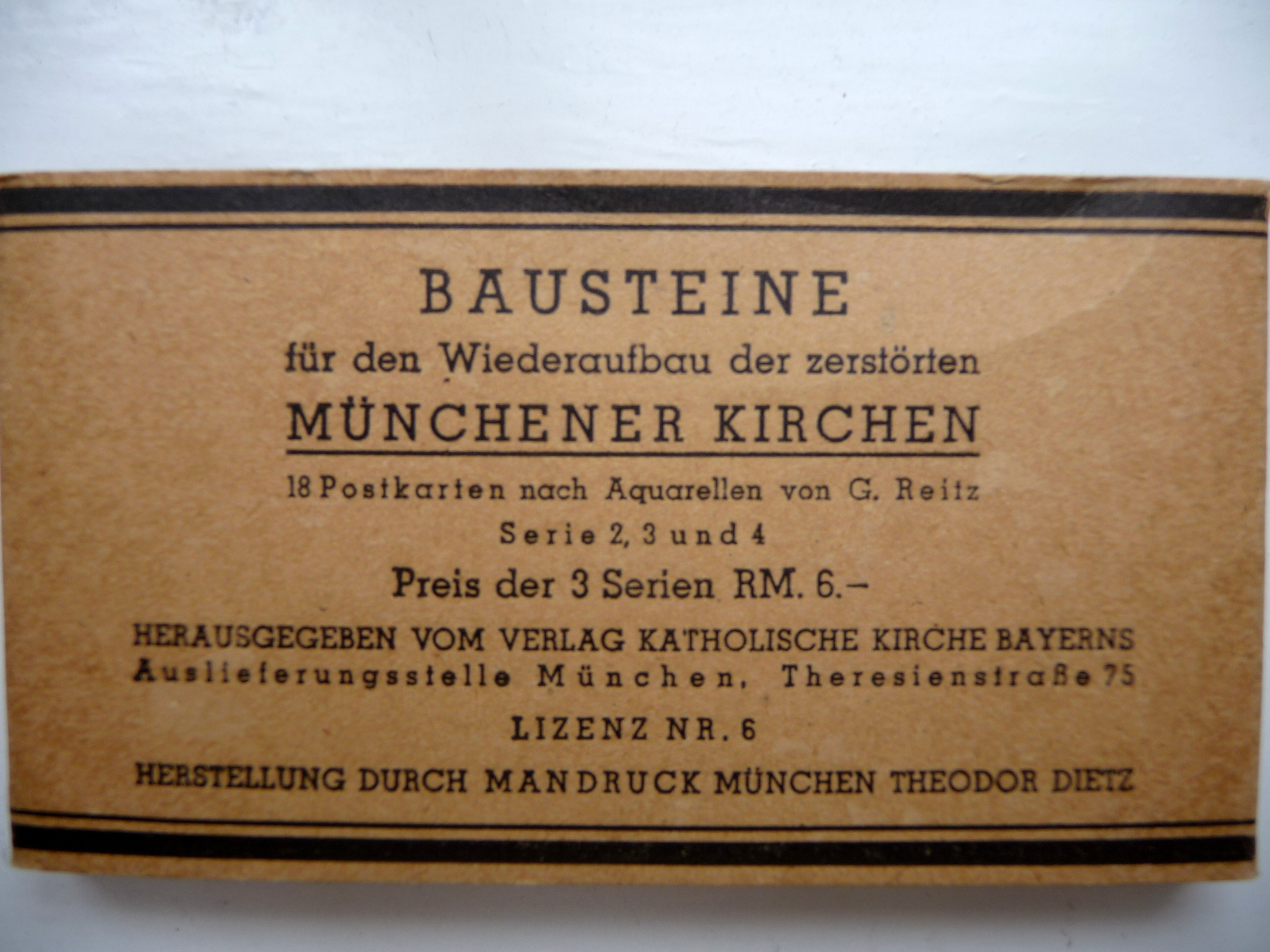 Manschette von 18 Postkarten mit Motiven zerstörter Münchner Kirchen in Aquarellen von G. Reitz. In verschiedene Serien, als "Bausteine für den Wiederaufbau" sollten diese finanzielle Mittel erbringen. Hrg.: Verlag Katholische Kirche Bayerns, undatiert